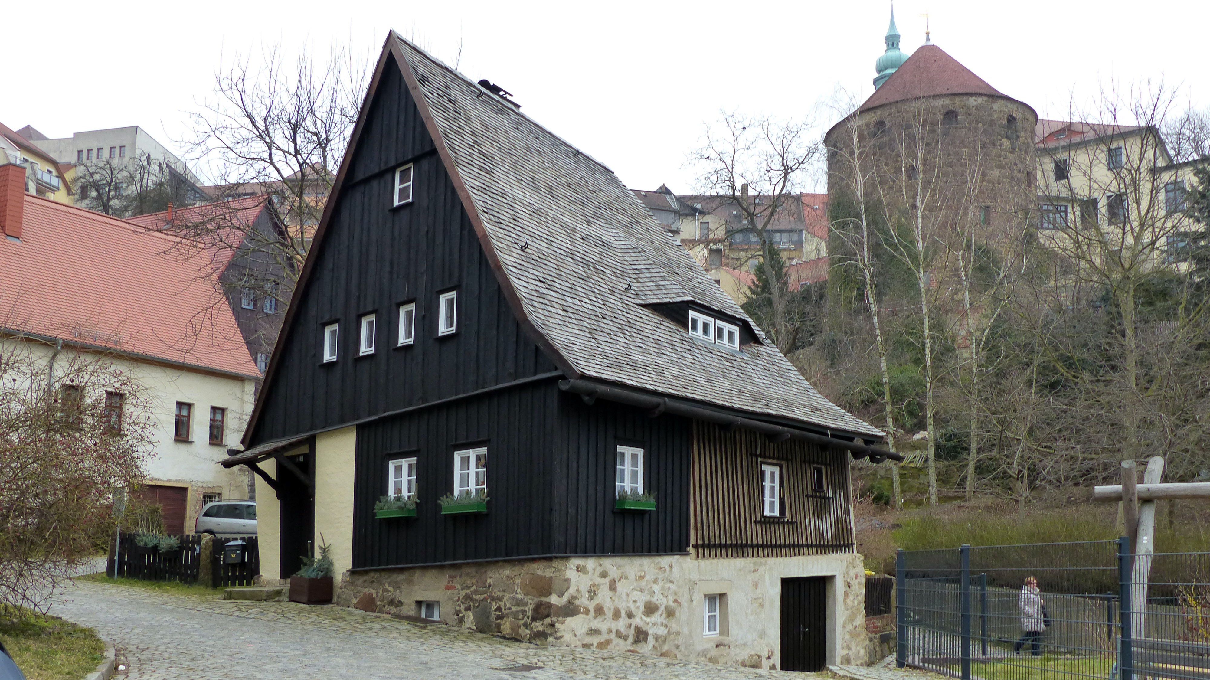 Hexenhäusel, Vor der Fischerpforte 6, Bautzen Hornjoserbsce: Wjerina chěžka, Před rybarskimi wrótkami 6, Budyšin